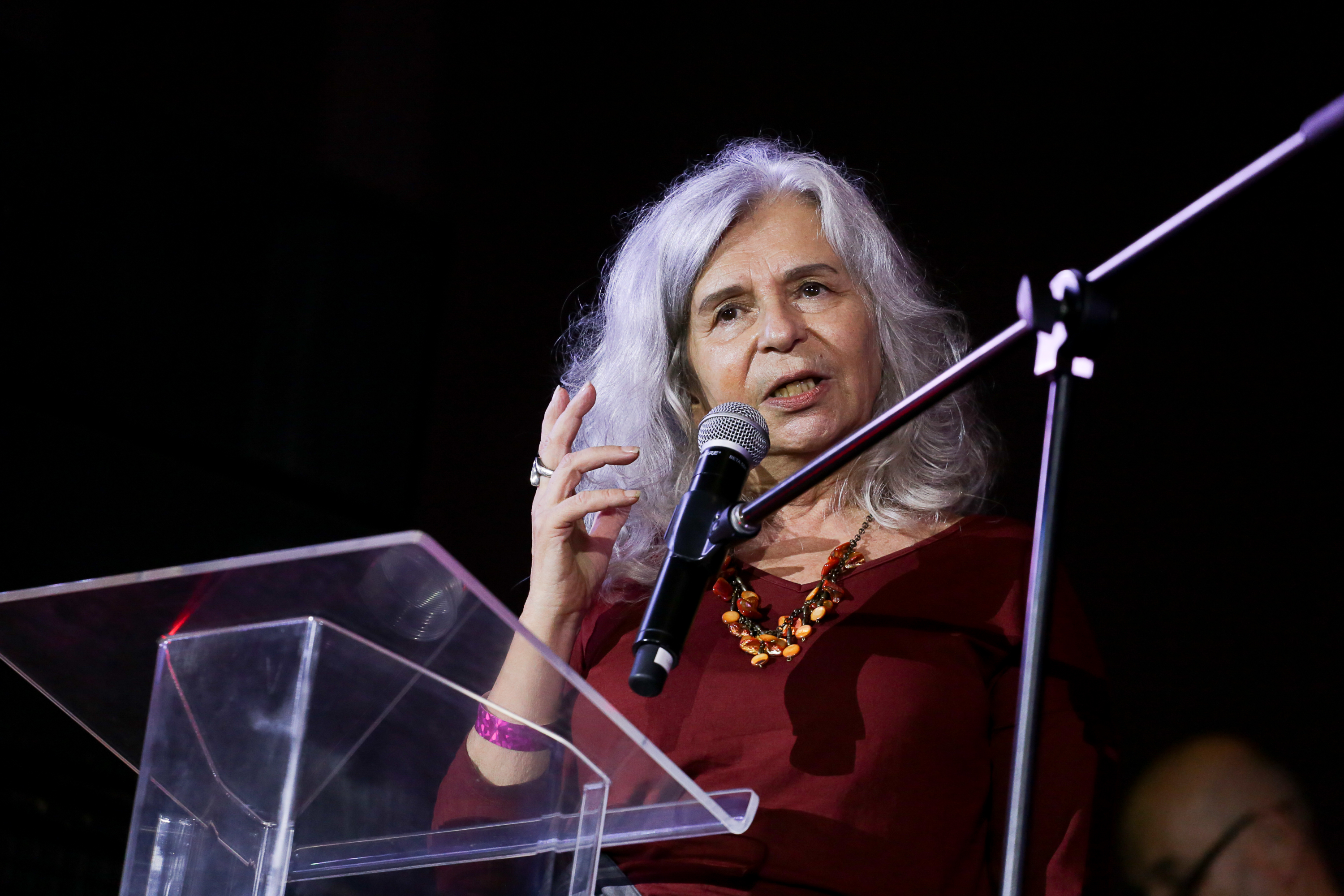 A poetisa Alice Ruiz durante Ato realizado em São Paulo em 18 de janeiro de 2018. Crédito: Sérgio Silva